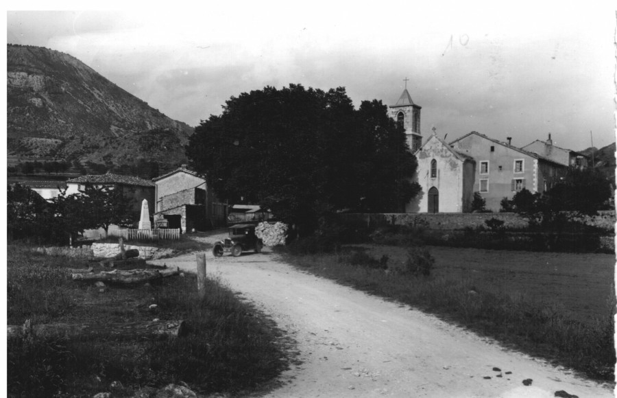 Village de La Roque-Esclapon, début XXème siècle, vue sur l'église